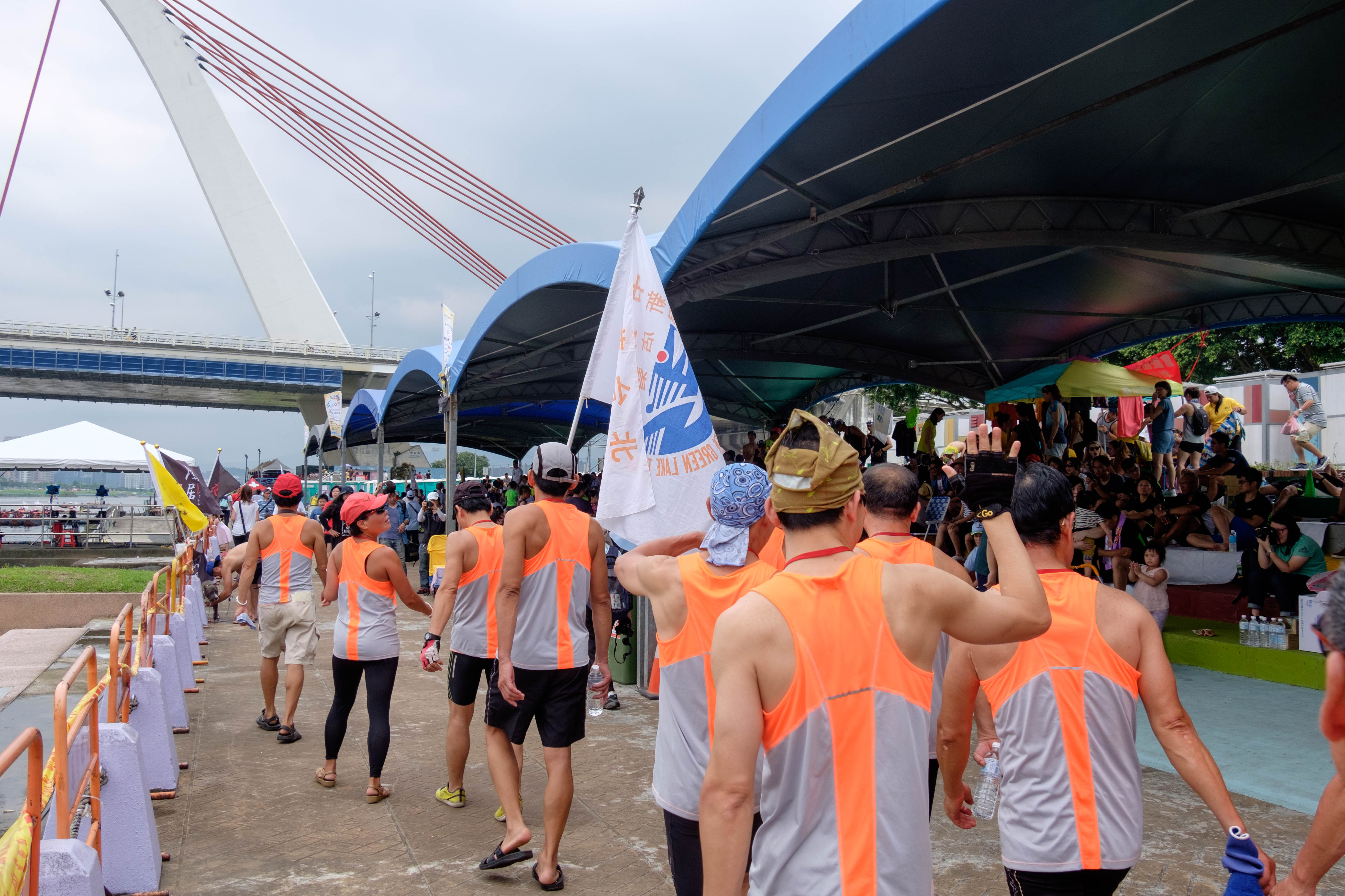 2017臺北國際龍舟錦標賽，5月30日下午比賽開始前，參賽隊伍整隊前往碼頭，接受觀眾祝福。